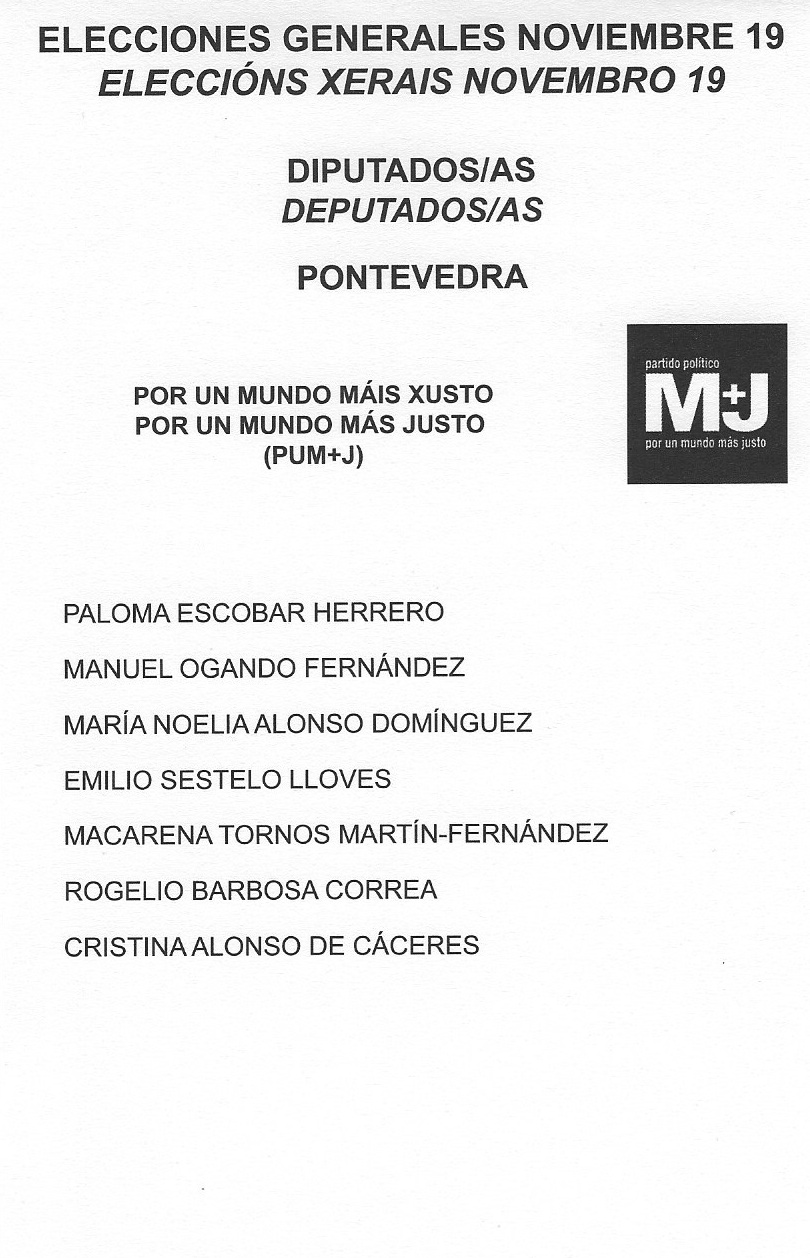 Papeleta electoral para o Congreso dos Deputados - Eleccións Xerais de España de novembro de 2019, Circunscrición electoral de Pontevedra